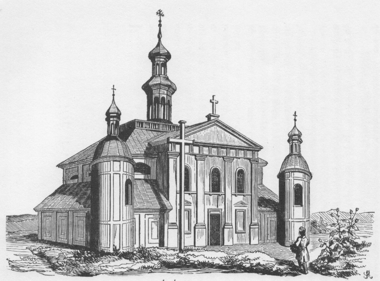 Kościół Matki Boskiej Loretańskiej w Warszawie (Praga)